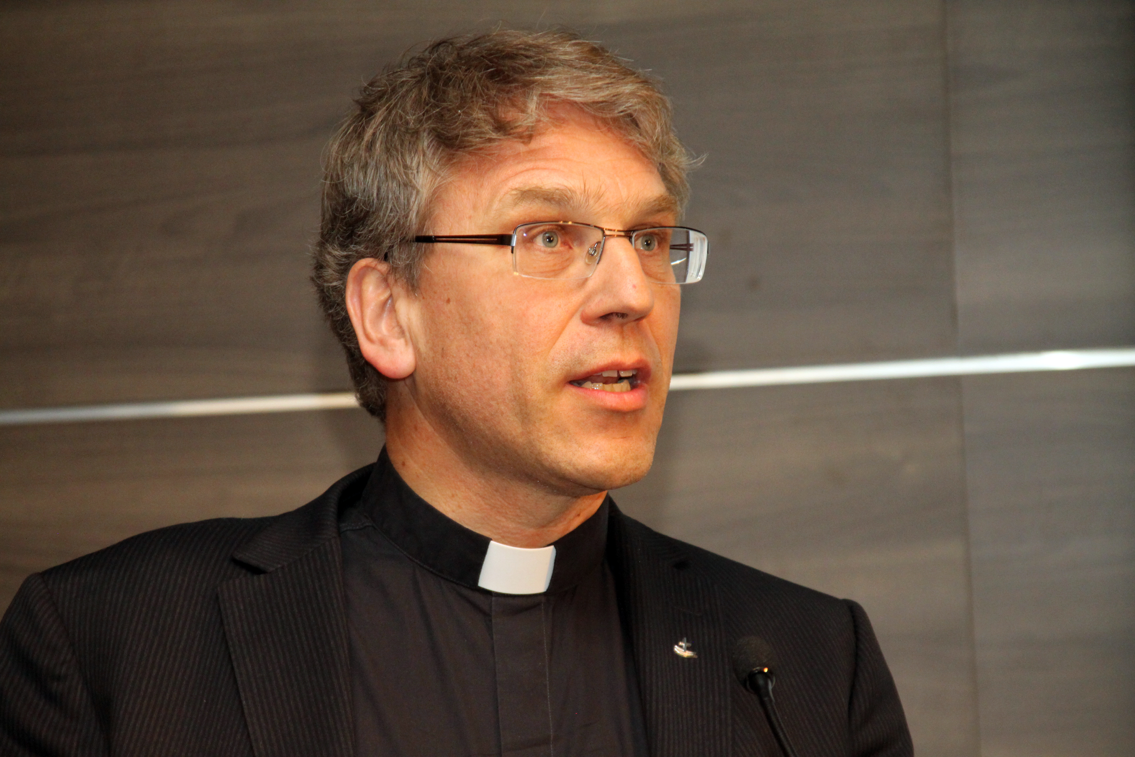 Fra Kirkemøtet 2014